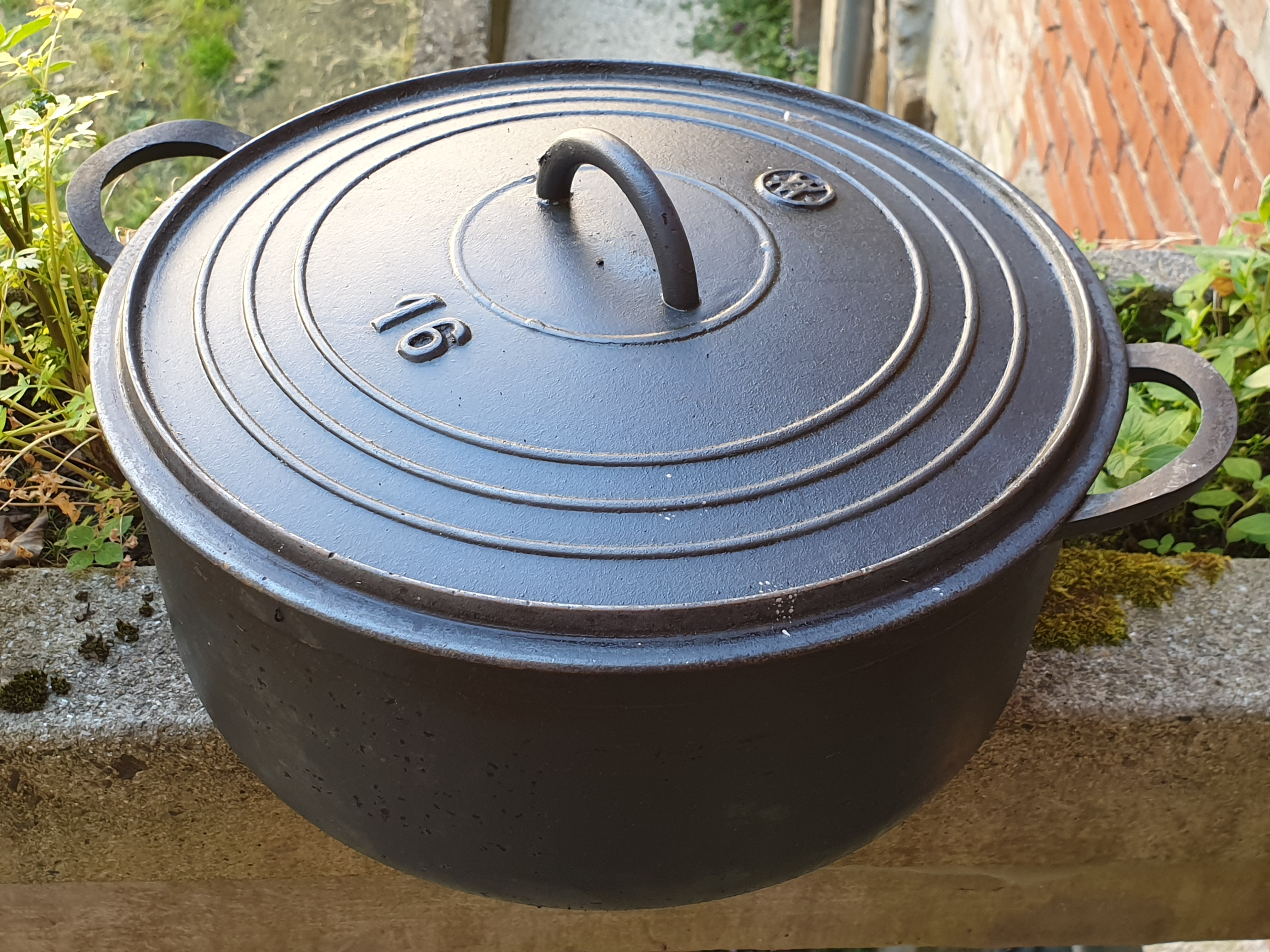 Cocotte française en fonte non-émaillée, marque AV, vers 1930.